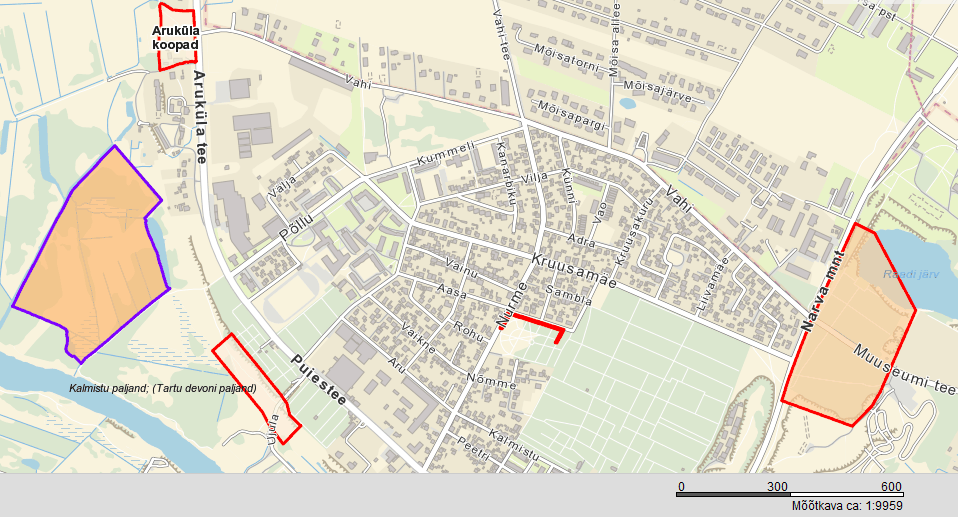 Aruküla koopad, Kalmistu paljand, Ebatsuuga allee ja Raadi park koos dendropargiga Maa-ameti kaardil.